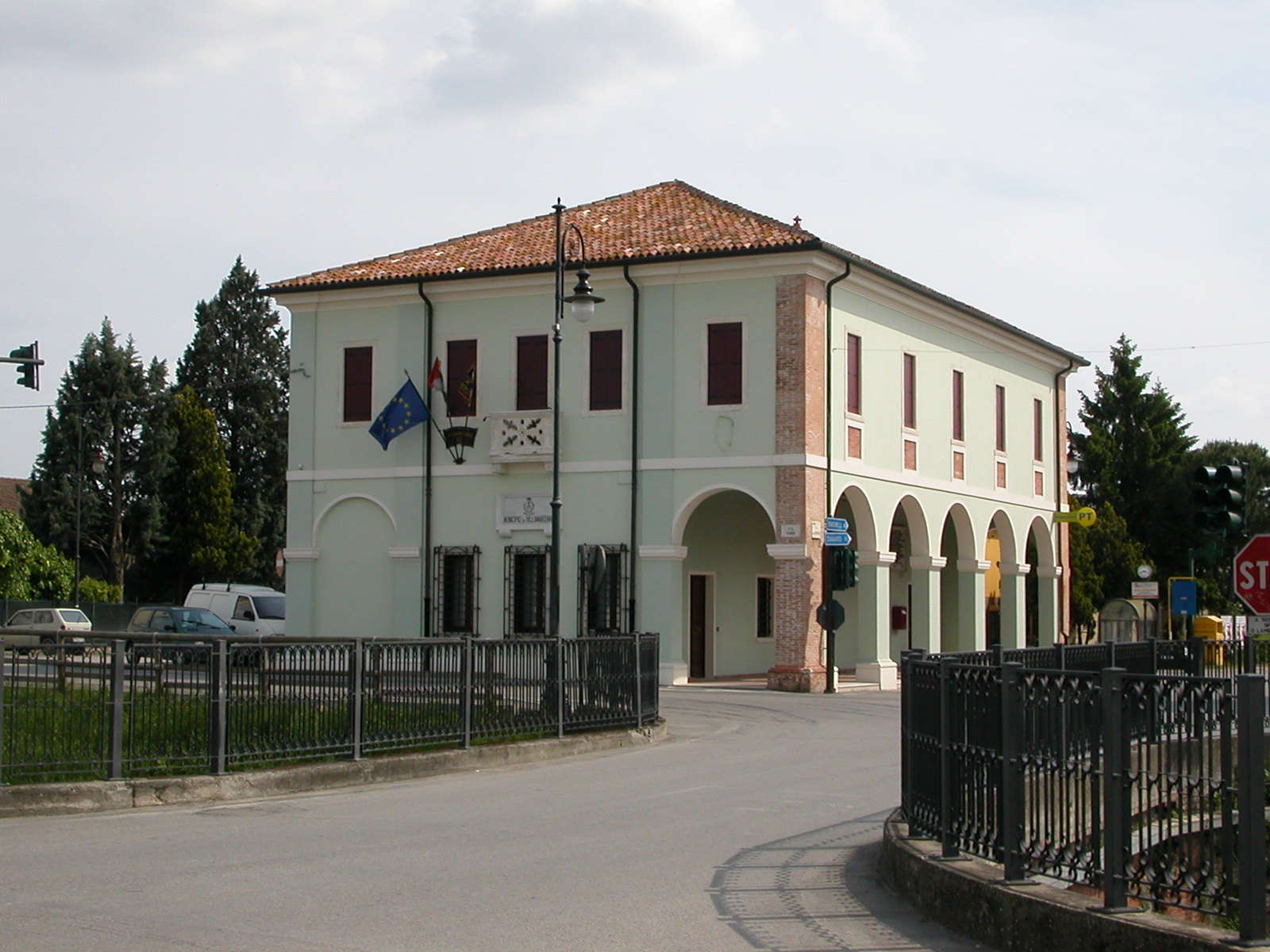 Municipio, sede dell'amministrazione comunale di Villamarzana, provincia di Rovigo.